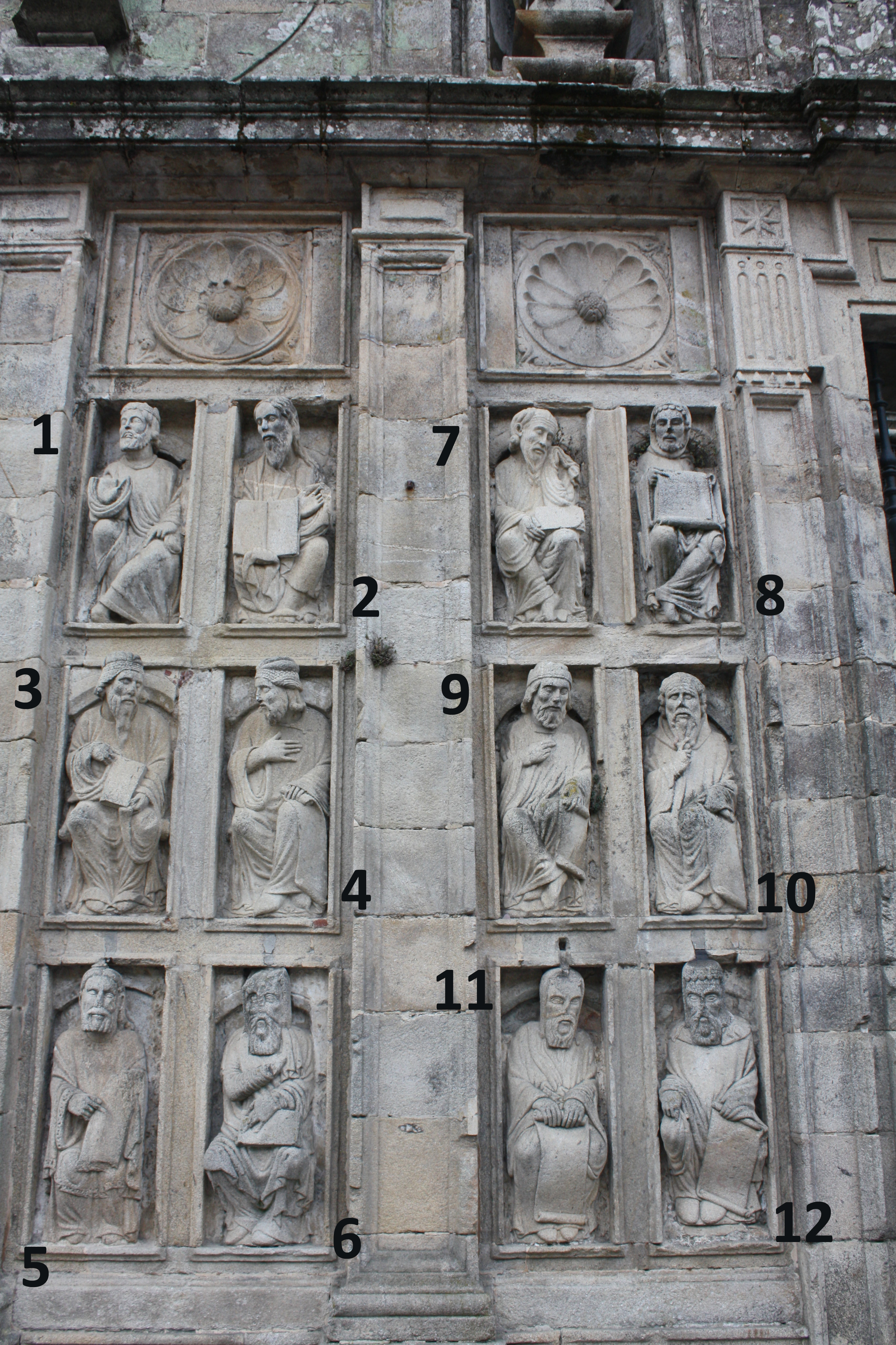 Porta Santa da catedral de Santiago de Compostela (grupo de esculturas á esquerda do espectador): 1. rei Salomón; 2. Moisés; 3. profeta Daniel; 4. profeta Isaías; 5. Aarón; 6. profeta Nahún; 7. San Lucas evanxelista; 8. profeta Hageo; 9. rei Saúl; 10. profeta Zacarías; 11. Santo André apóstolo; 12. Simón apóstolo.